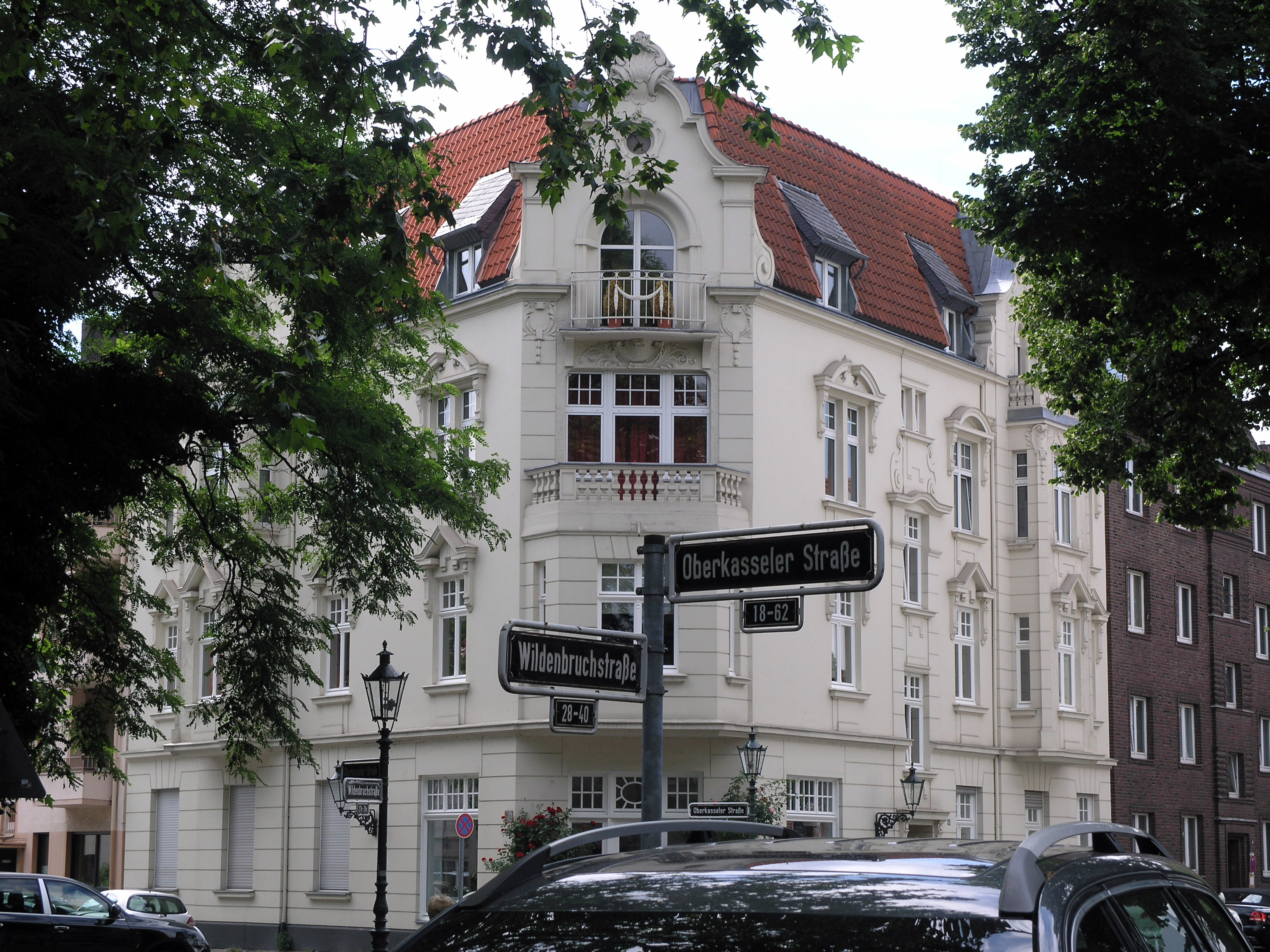 Северный Рейн-Вестфалия, Дюссельдорф - Оберкассель